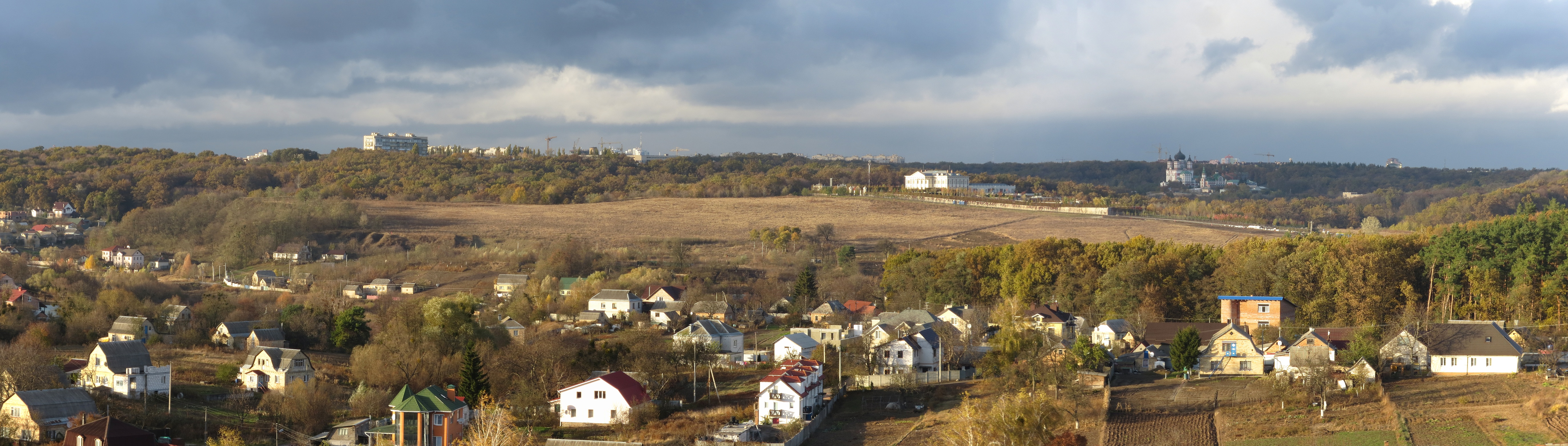 Хотівське городище (на задньому плані). Панорама з півдня.